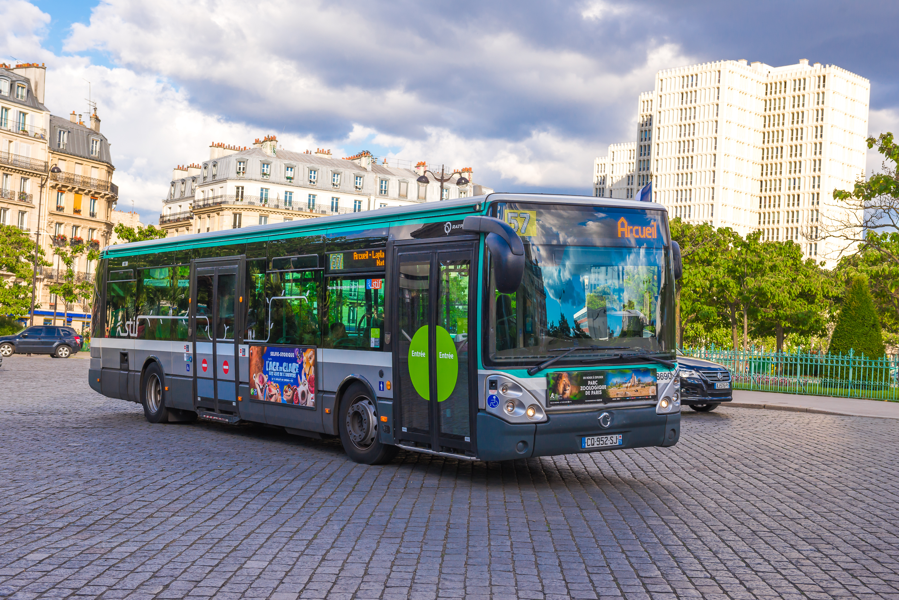 Irisbus Citelis 12 sur la ligne 57.